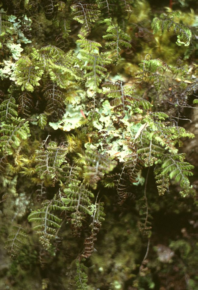 Hymenophyllum dentatum, Hymenophyllaceae - Chile, Salto de Petrohué (Prov. de Llanquihue)